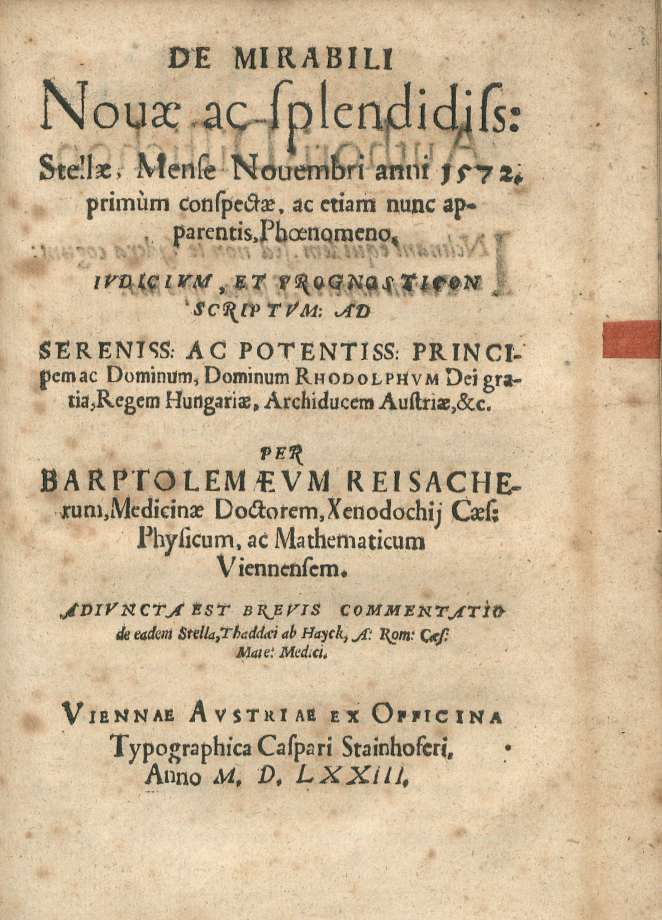 Titelblatt von Bartholomäus Reisachers De mirabili Stellae, Mense Nouembri anni 1572 primum conspectae, ac etiam nunc apparentis Phœnomeno